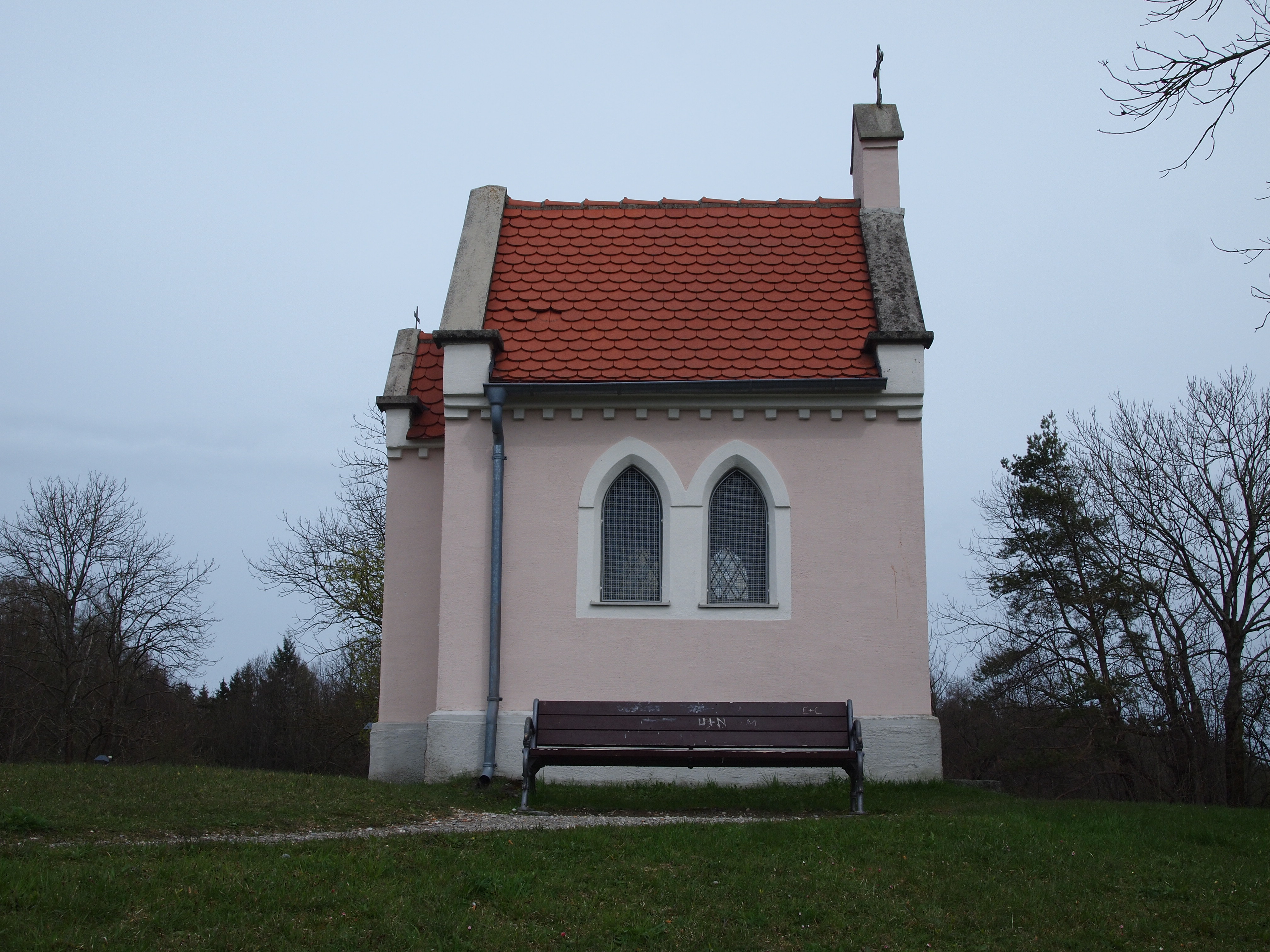 Kaufbeuren, Höfelmayr-Kapelle, Augsburger Straße 91